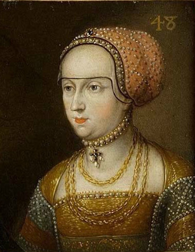 Portrait de Marie de Bourbon, épouse de Jean II, duc de Lorraine de 1453 à 1470. Ce tableau fait partie d'une suite d'une soixantaine de double-portraits représentant les ducs et duchesses de Lorraine ainsi que leurs ancêtres supposés. Musée des Offices, Florence (Inv. 1890, 641)